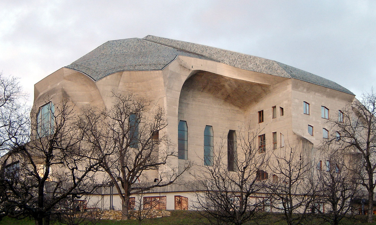 Goetheanum, Sitz der Allgemeinen Anthroposophischen Gesellschaft, Dornach SO, Schweiz